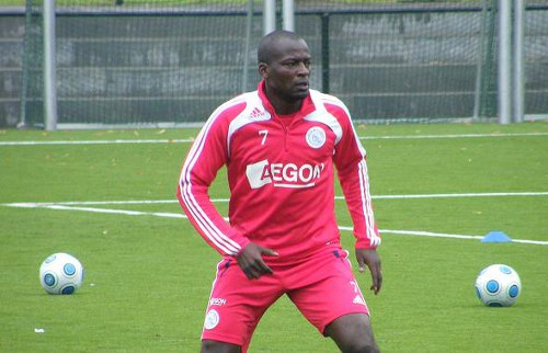 Atouba, player of Ajax Amsterdam